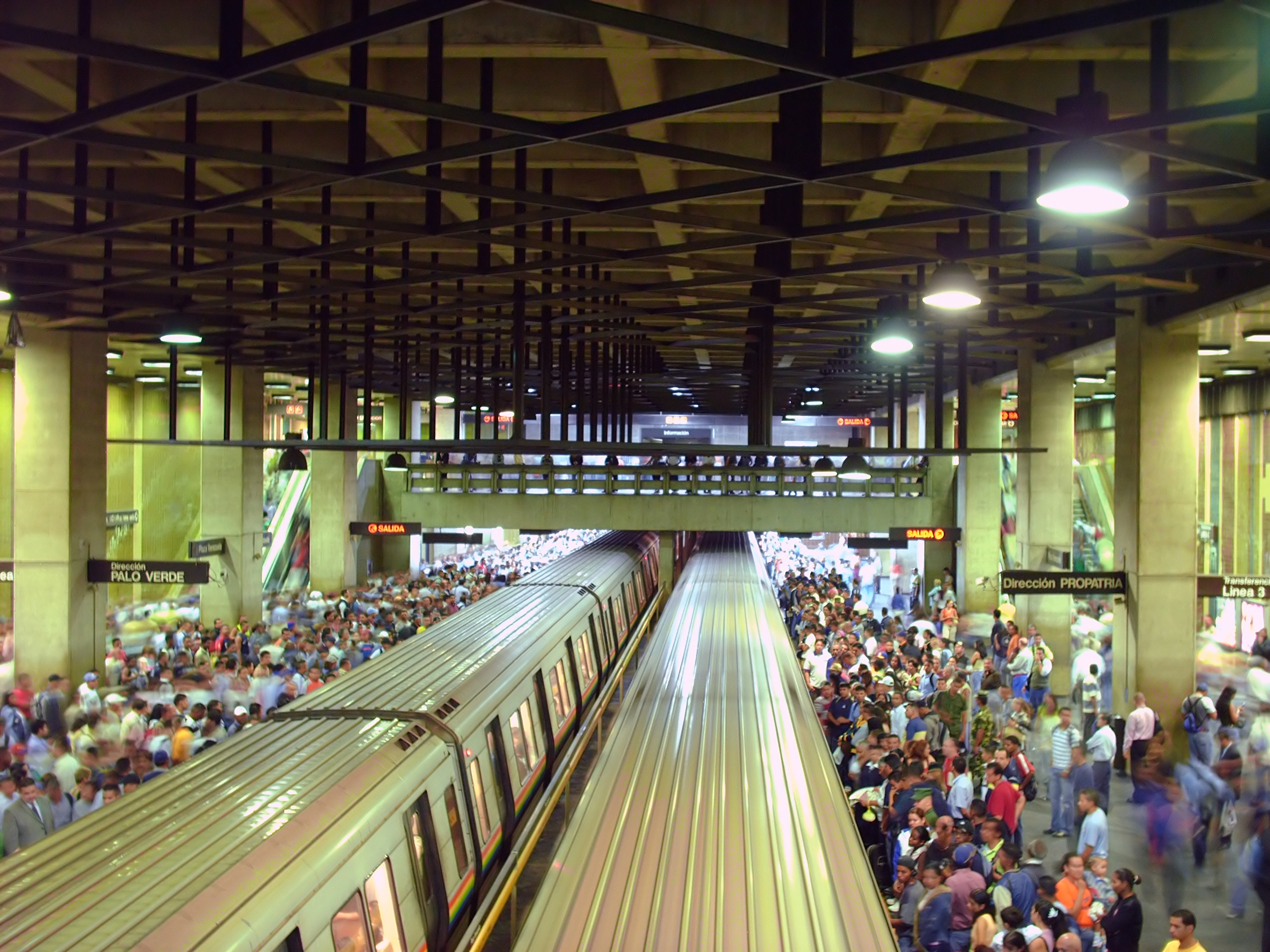 Estación Plaza Venezuela, Nivel de los andenes